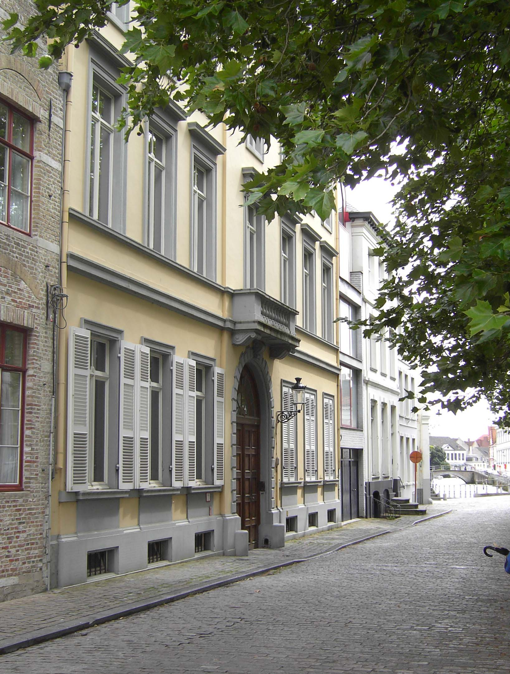 Brugge (Belgium) - hier waren de burelen gevestigd van brouwerij Aigle-Belgica, later Piedboeuf, later Interbrew, later Inbev, later Anheuser-Busch Inbev.